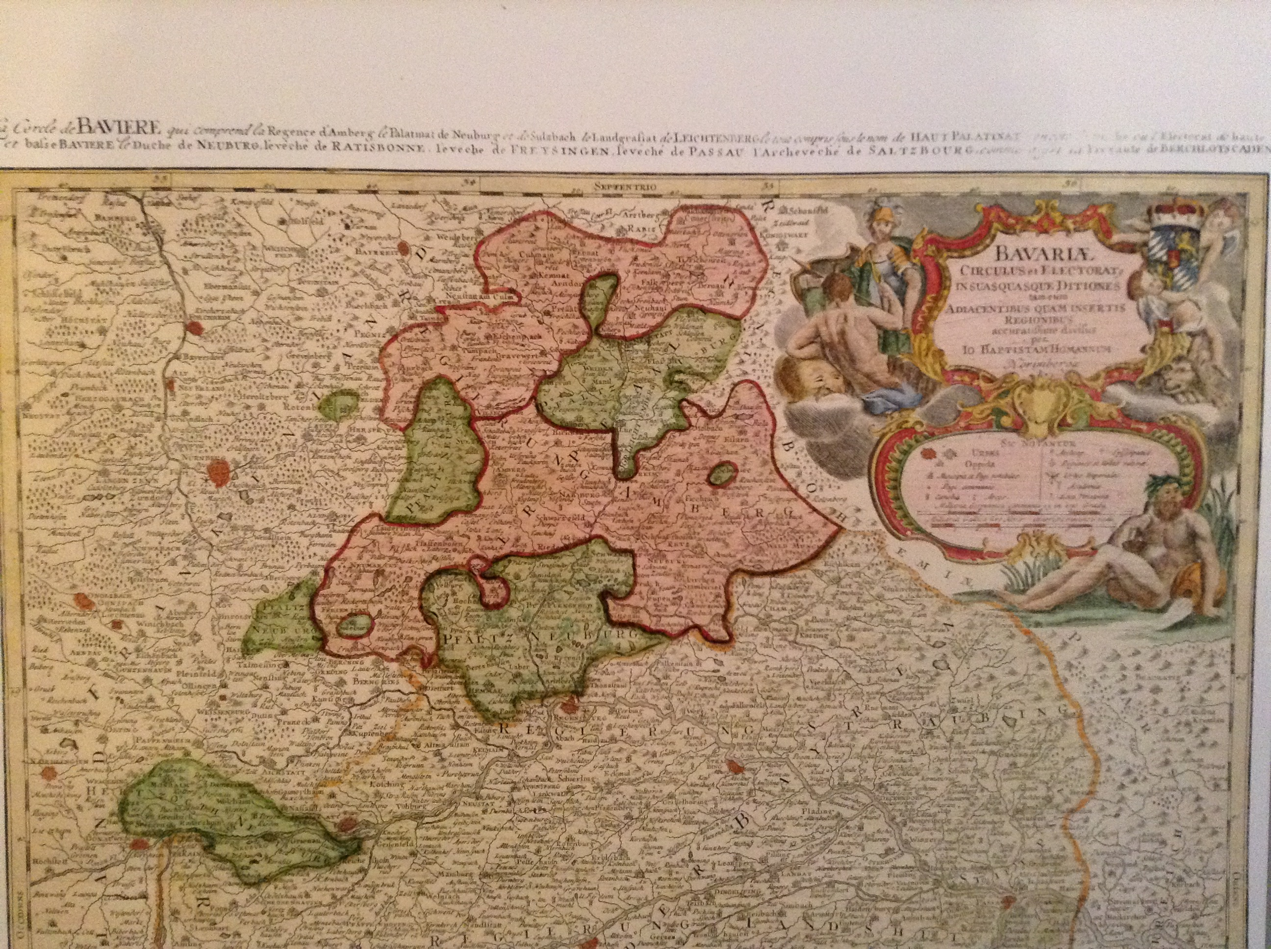 Historische Karte aus dem 18. Jahrhundert, gibt die Oberpfalz (rot), die Herzogtümer Pfalz Neuburg und Pfalz Sulzbach (grün) wieder. Im Süden schließt sich das restliche Kurbayern an. Die Reichsstädte Nürnberg und Regensburg erscheinen als rotbraune Punkte. Leicht verzerrte Ansicht!